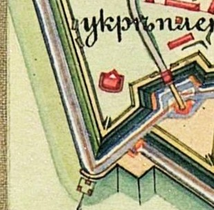 Брест-Литовск.